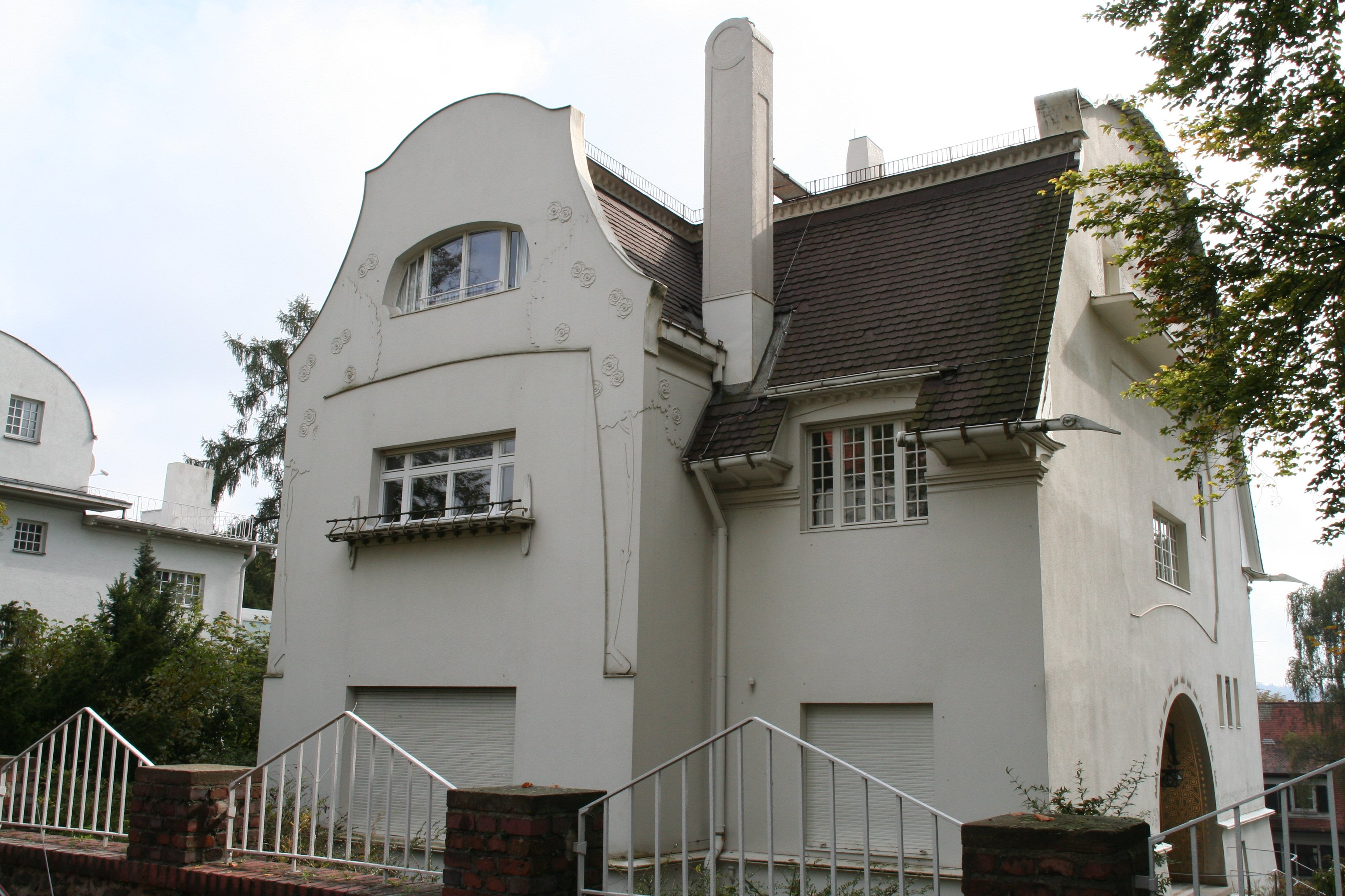 Großes Glückerthaus auf der Mathildenhöhe, Darmstadt (Germany)